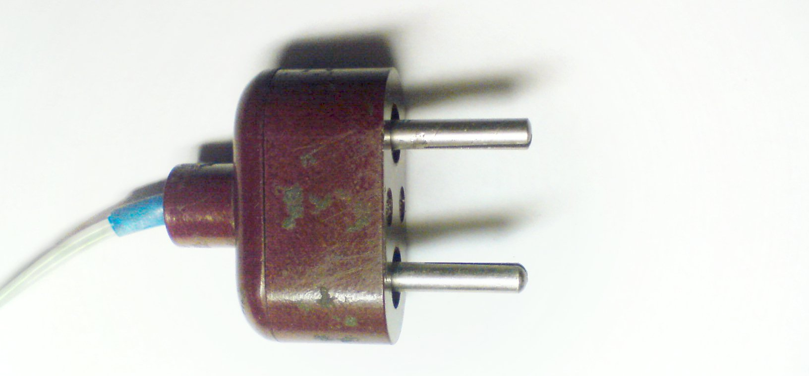 Советская штепсельная вилка с разрезными штифтами в сборе